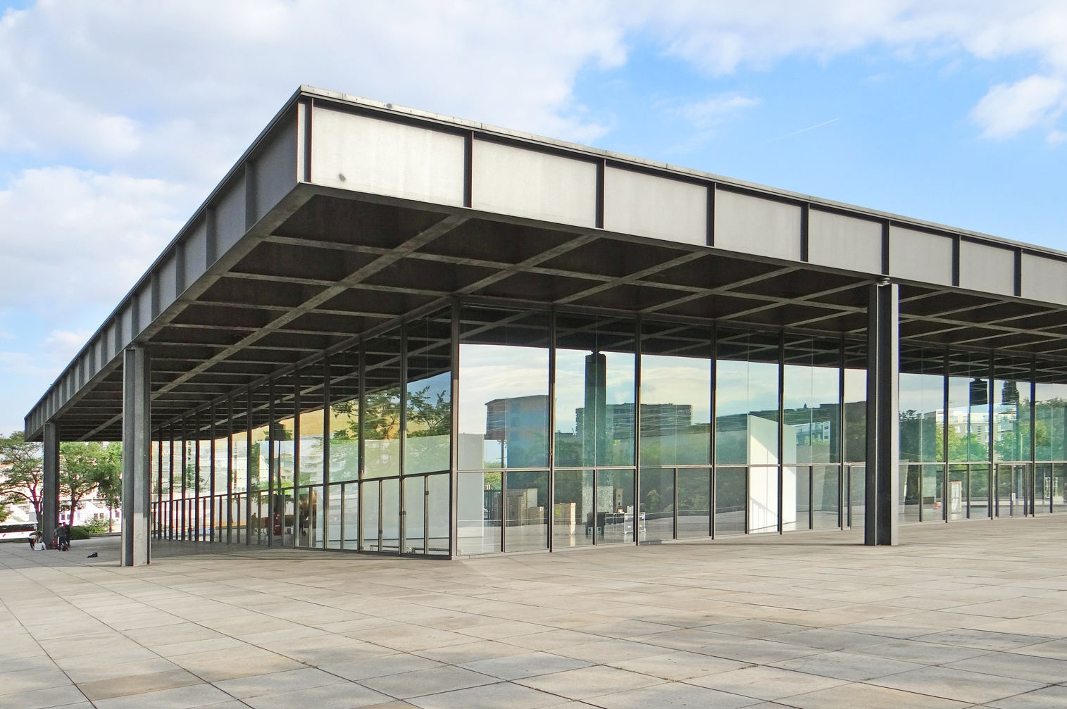 La nouvelle Galerie national / Neue Nationalgalerie / New National Gallery Le bâtiment a été conçu par l'architecte Mies van der Rohe, dernier directeur du Bauhaus, et inauguré en 1968. C'est le seul édifice qu'il a construit après guerre en Allemagne. Le projet initial était destiné à un immeuble de bureaux à Cuba qui n'a pas été réalisé en raison de la révolution castriste. Huit colonnes d'acier placées sur un socle en granite gris supportent le toit carré lui aussi construit en acier. Les salles permanentes du musée sont situées au sous-sol, des expositions temporaires sont organisées au niveau supérieur qui est entouré de parois en verre. Article de Wikipedia Site Berlin en ligne Site du musée national